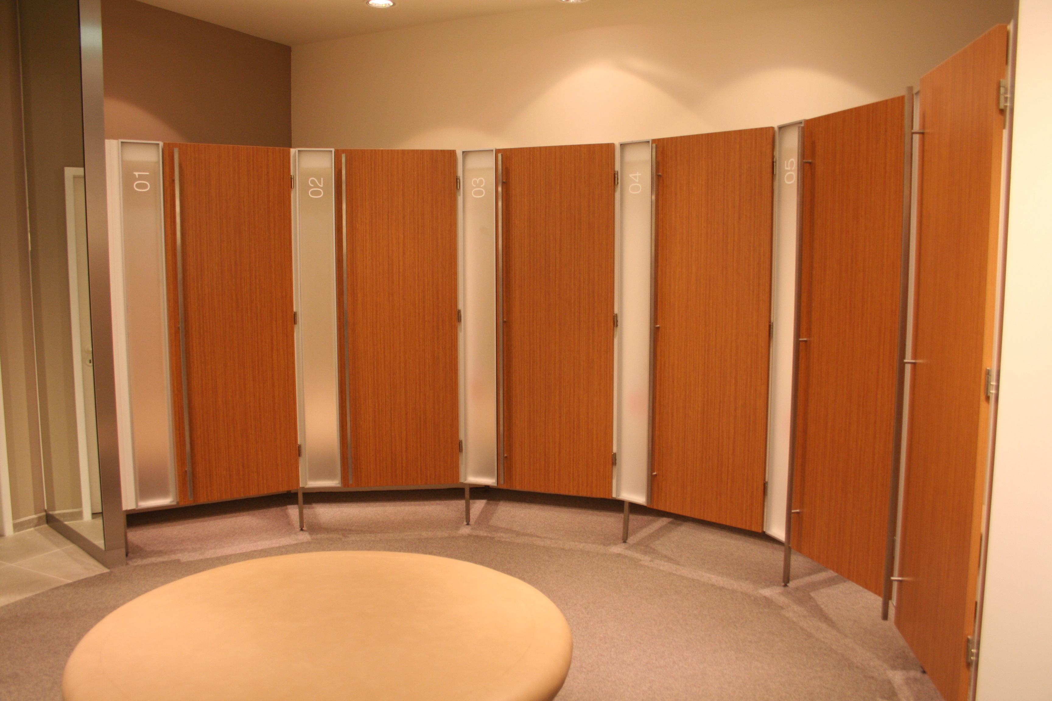 Une série de cabines d'essayage dans un centre commercial à l'extérieur de Copenhague.